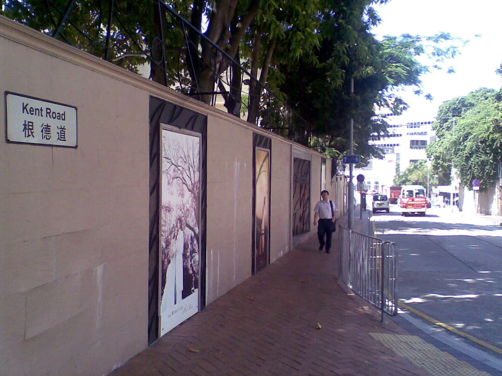 九龍塘zh:根德道